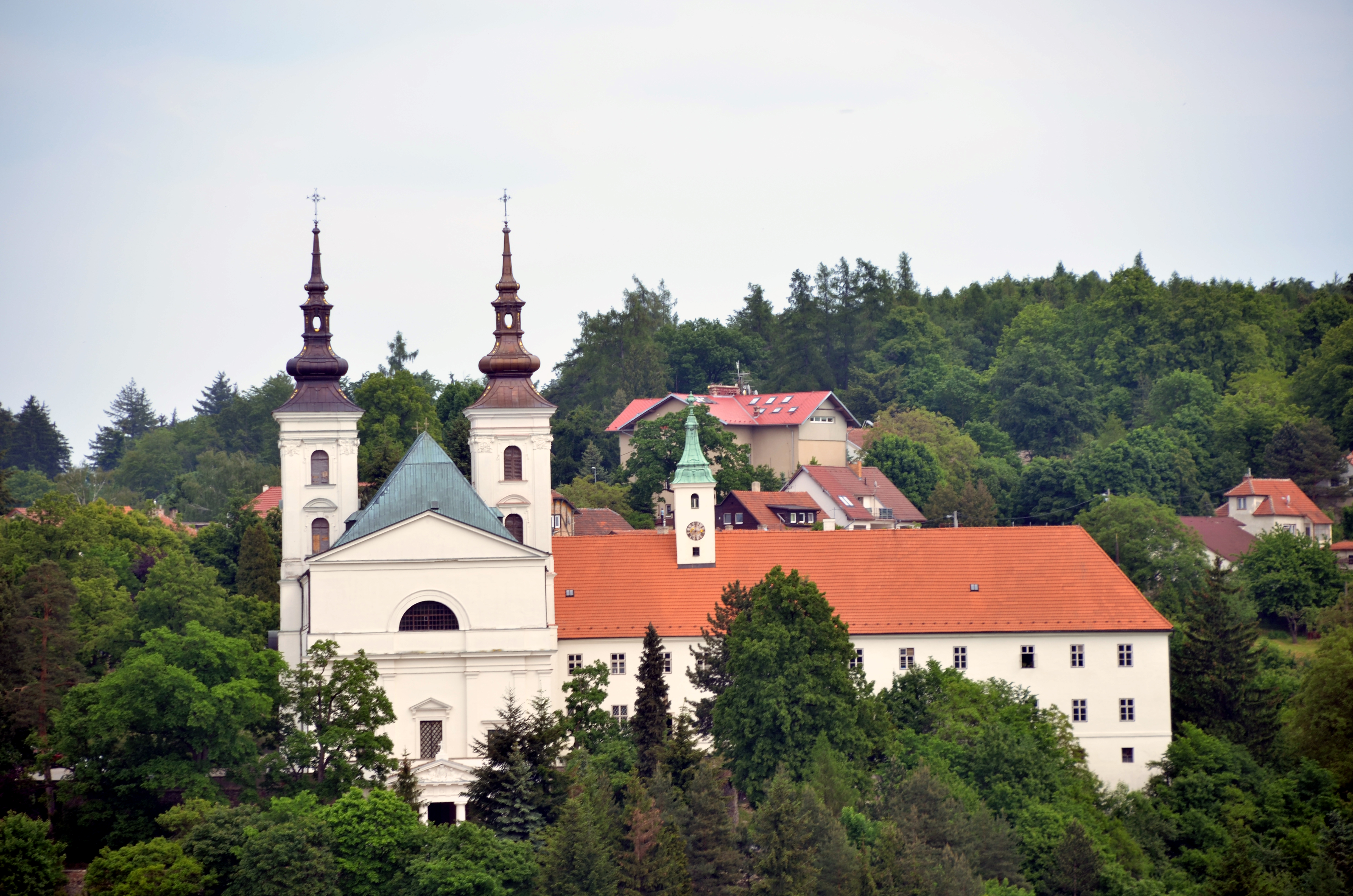 Vranovský kostel Narození Panny Marie s klášterem